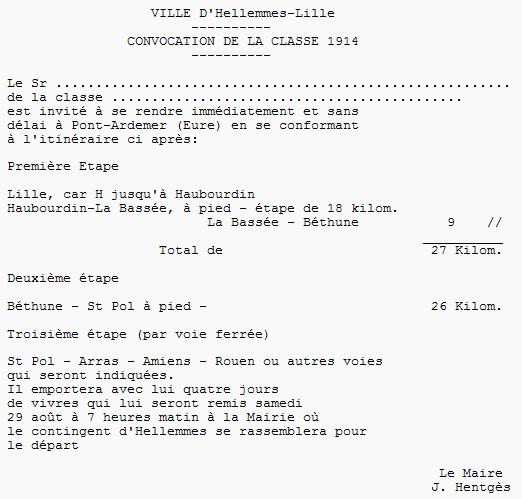 Copie du brouillon de la convocation de la classe 1914 à Hellemmes-Lille (l'original est manuscrit)